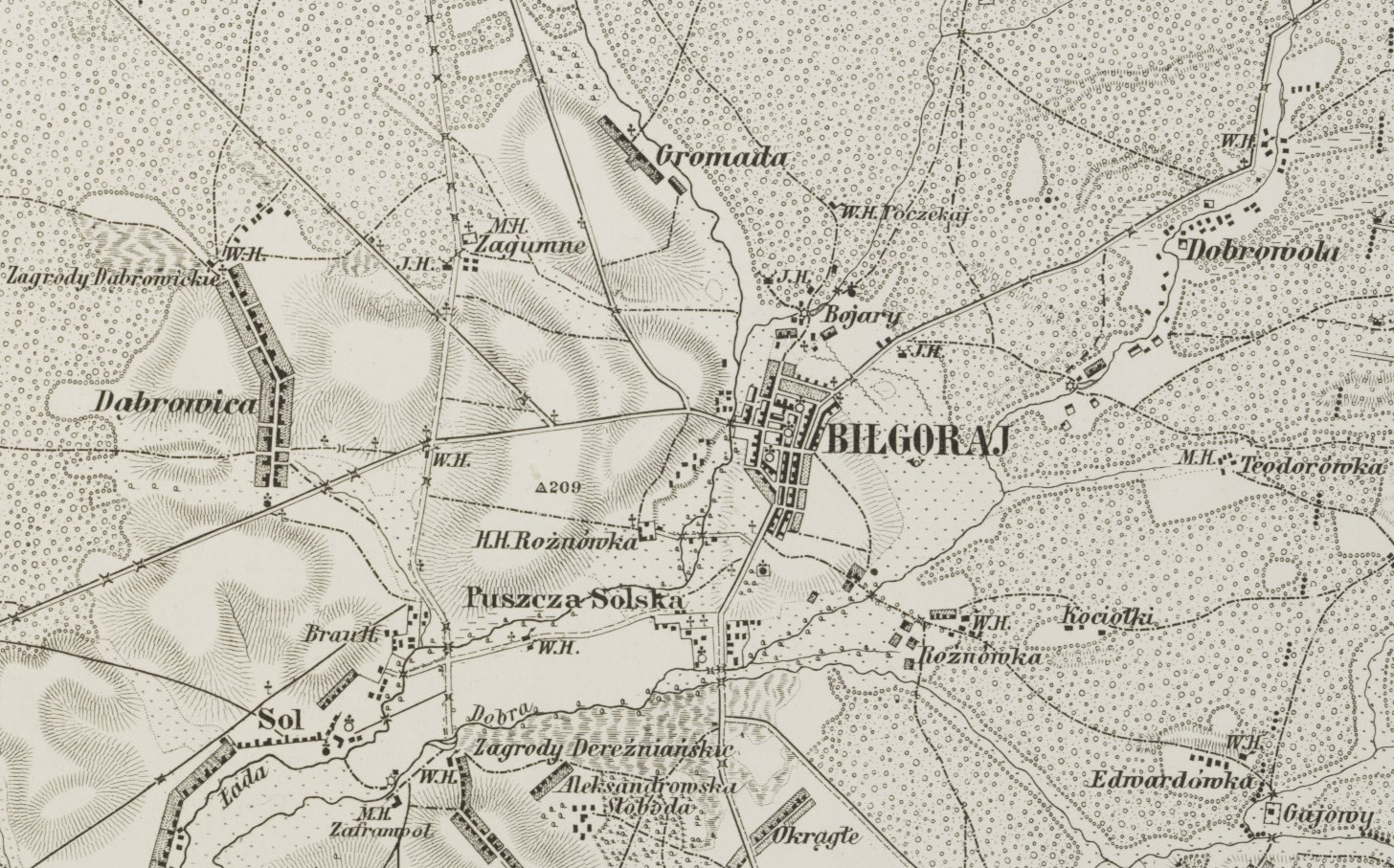 Biłgoraj na Spezialkarte der osterreichisch-ungarischen Monarchie.